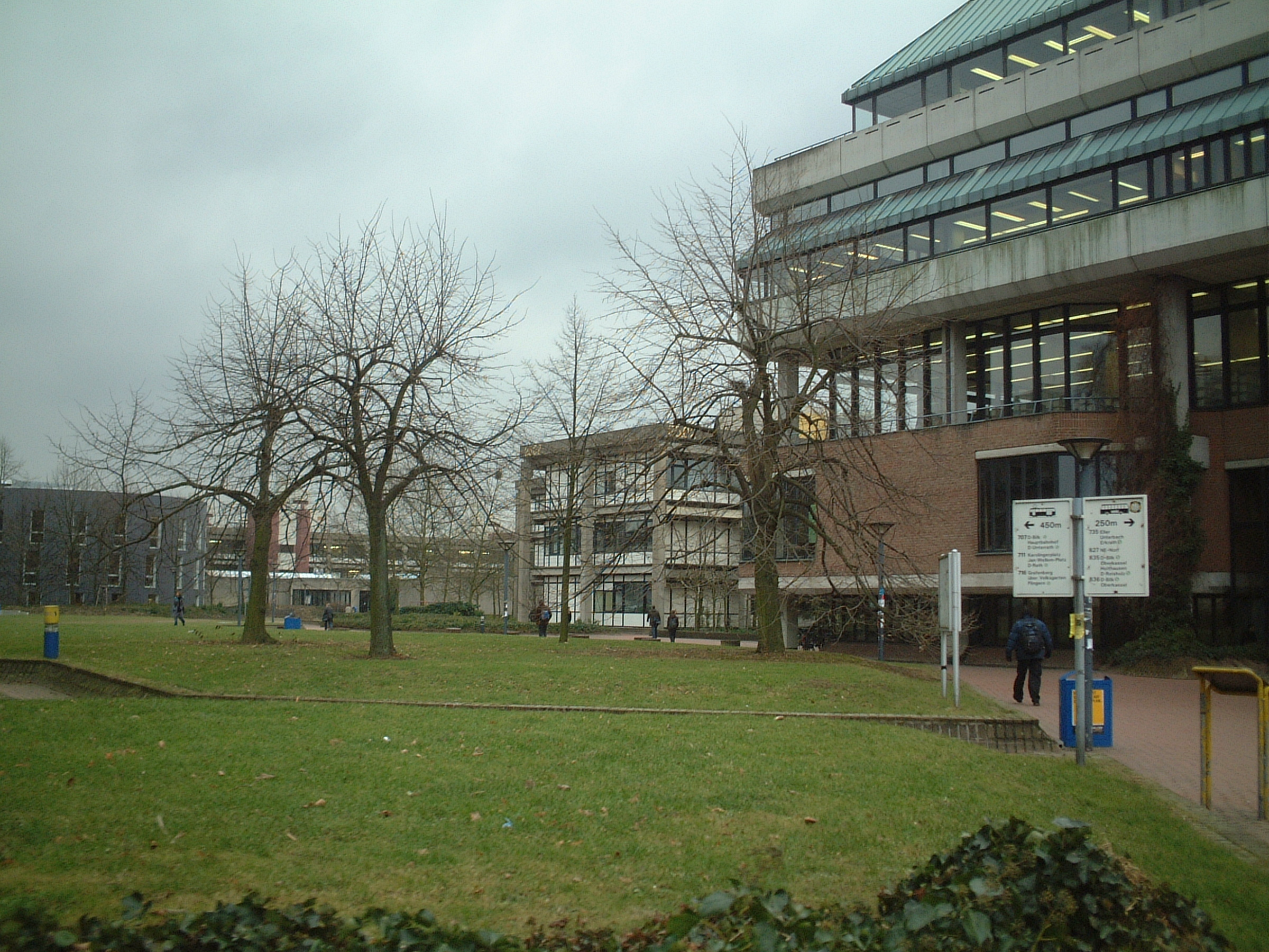 Autor: grendelshitsuren Heinrich-Heine University Campus